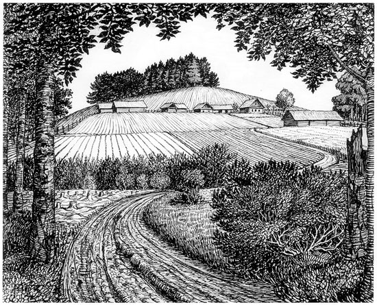 Вёска Гараватка. З альбома "Галубіцкая пушча". 1923 Папера, туш, пяро. 17,4x21,5 Нацыянальны музей, Вільнюс